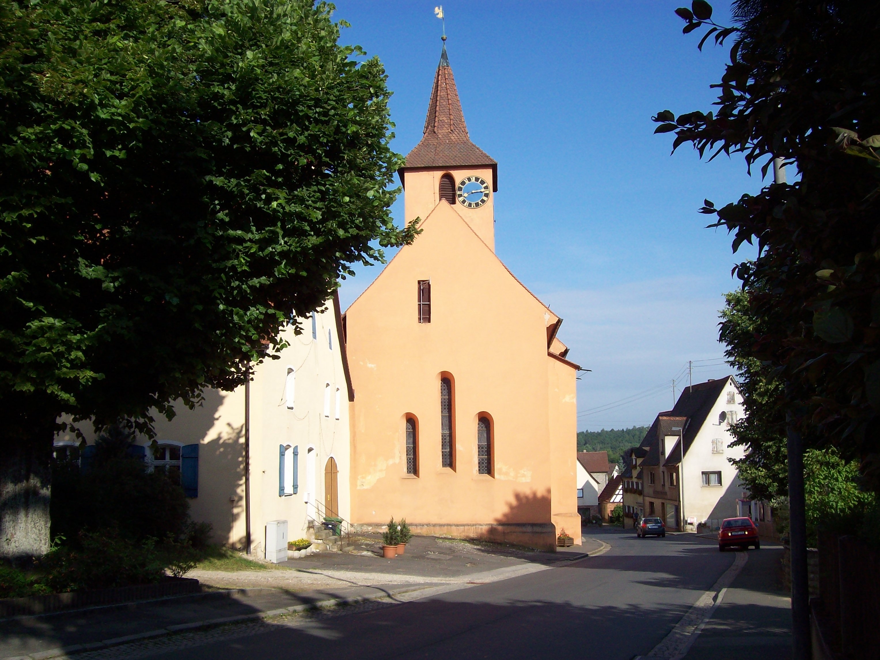 Pfarrkirche Engelthal